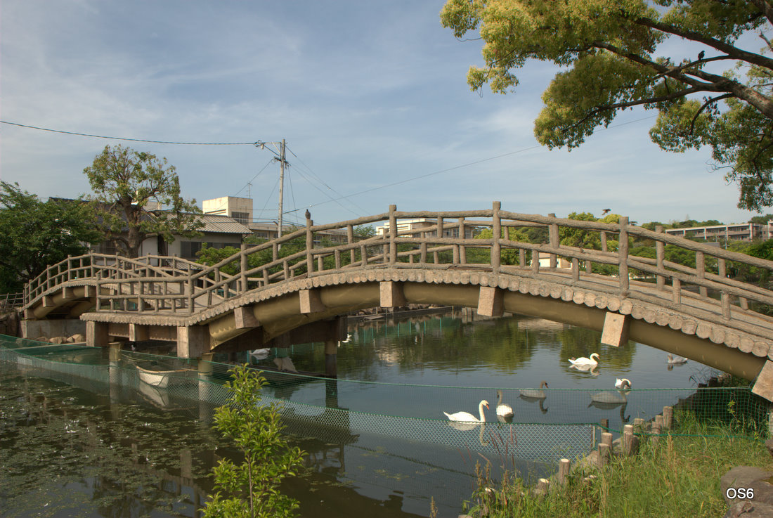 広島県福山市のどんどん池